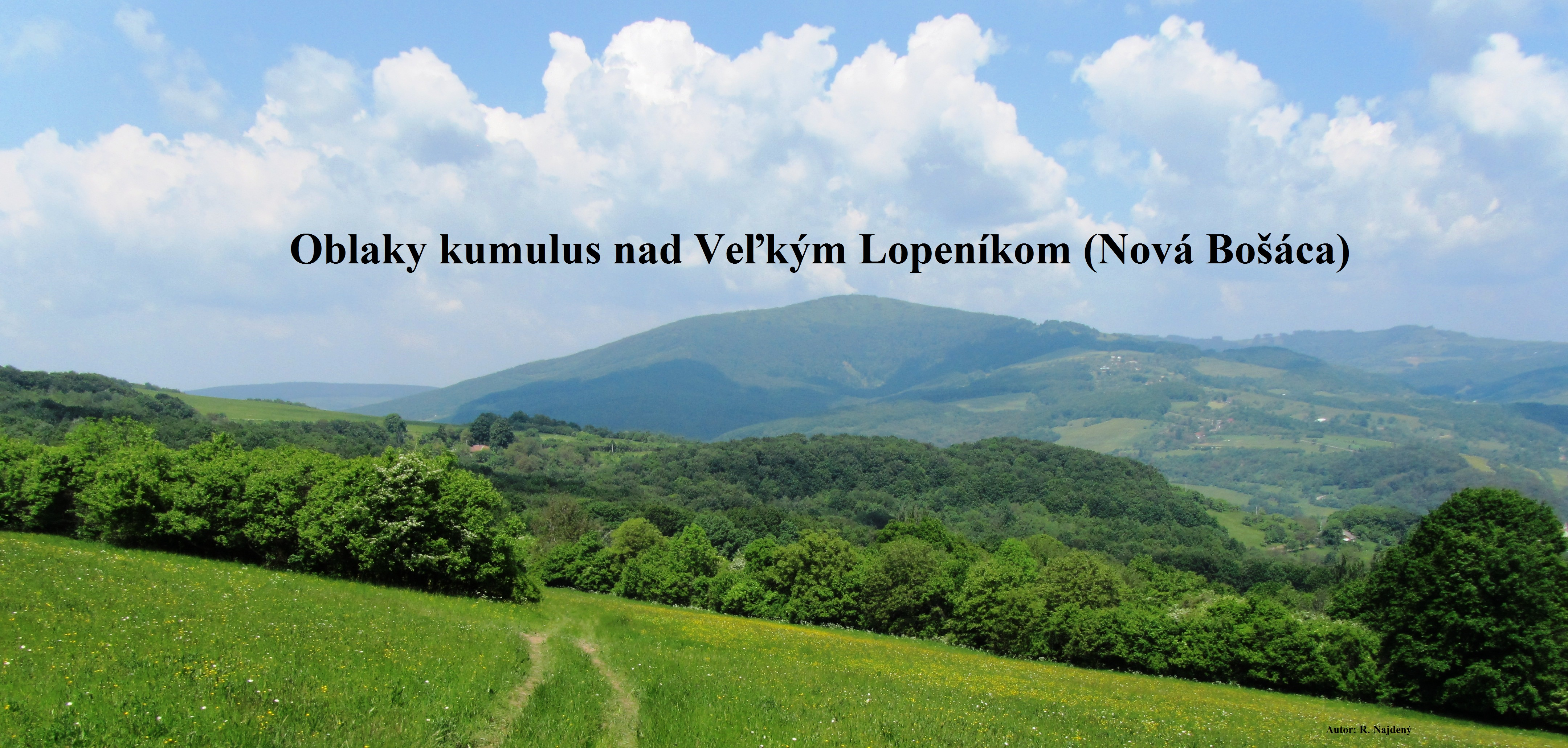 Oblaky nad Novou bosacou